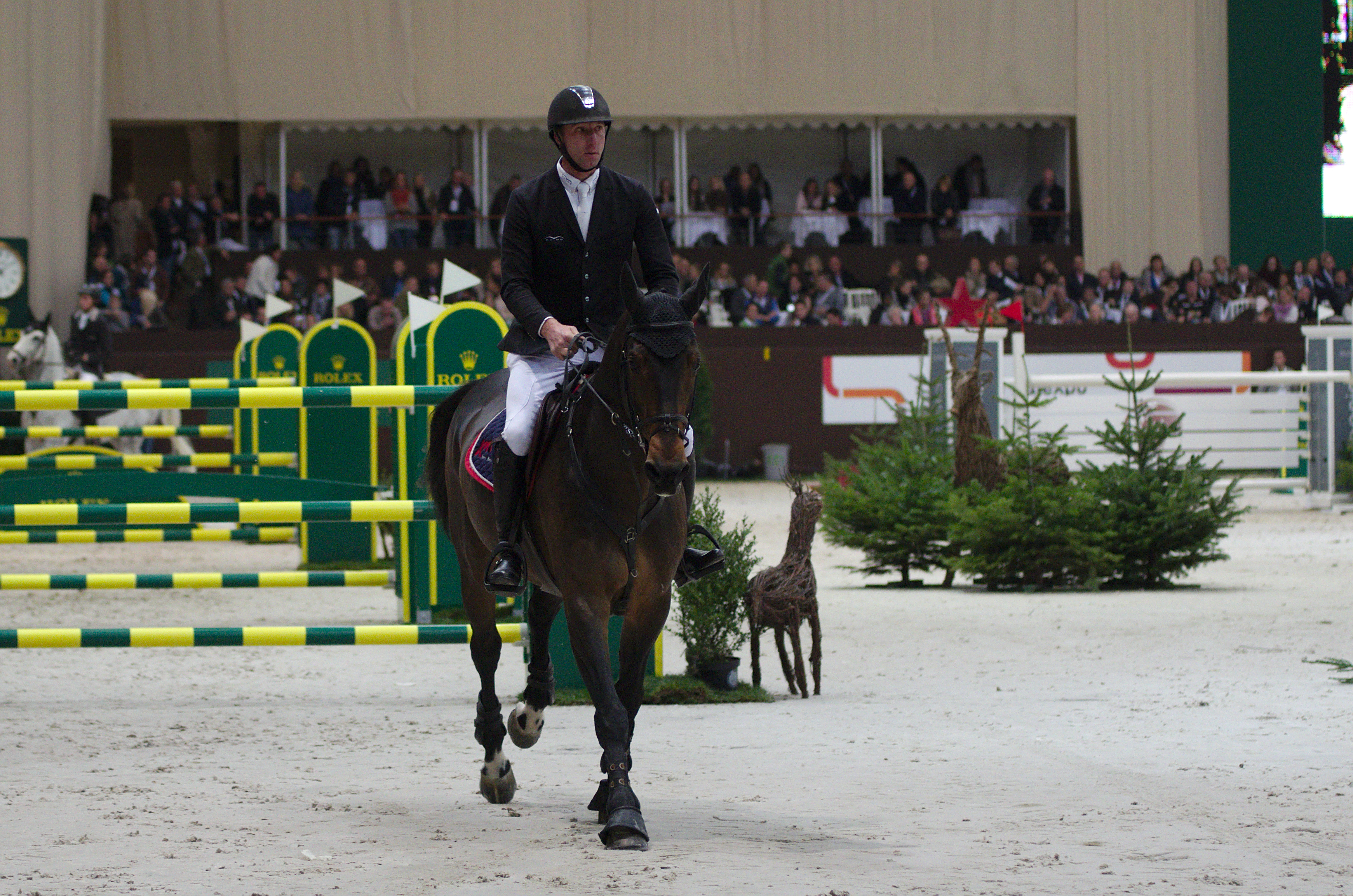 54eme CHI de Genève - 20141213 - Coupe de Genève - Jur Vrieling et Bubalu